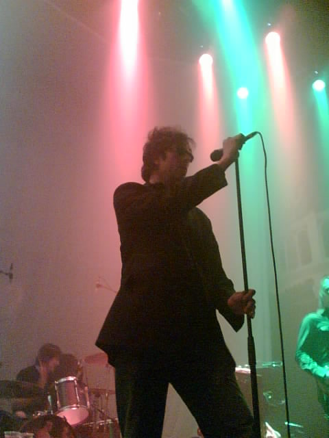 eigen werk (gebruiker Eve)